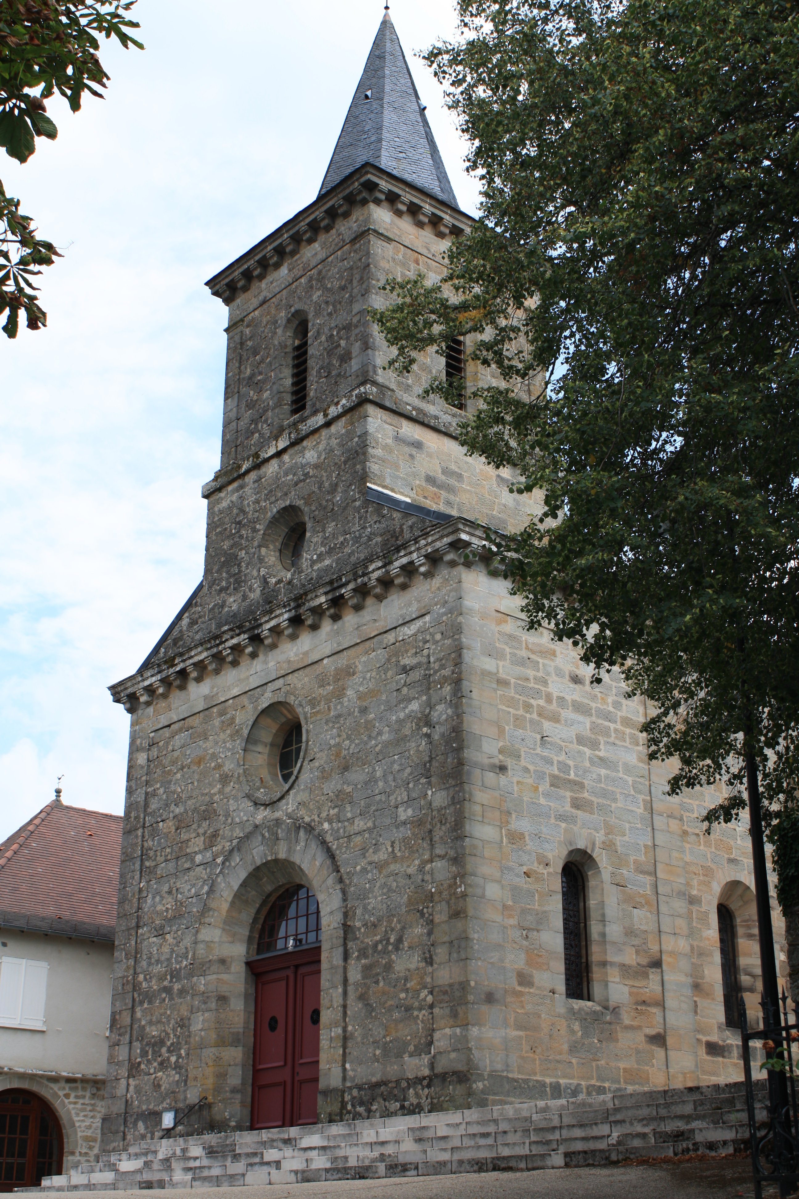 Église de Queyssac-les-Vignes